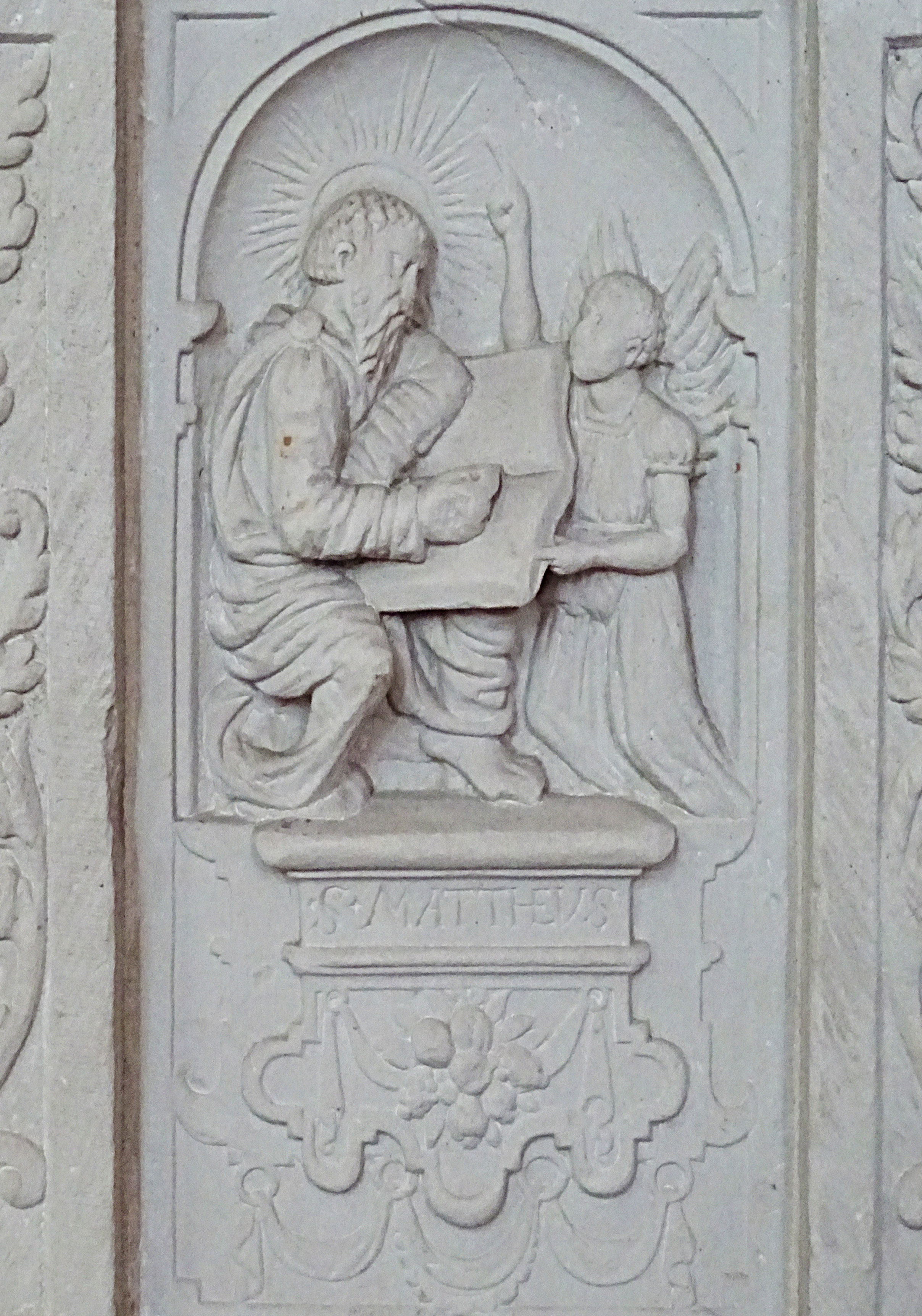 Steinbilderbibel in der St. Annenkirche (Eisleben), 26/29, Evangelist Matthäus